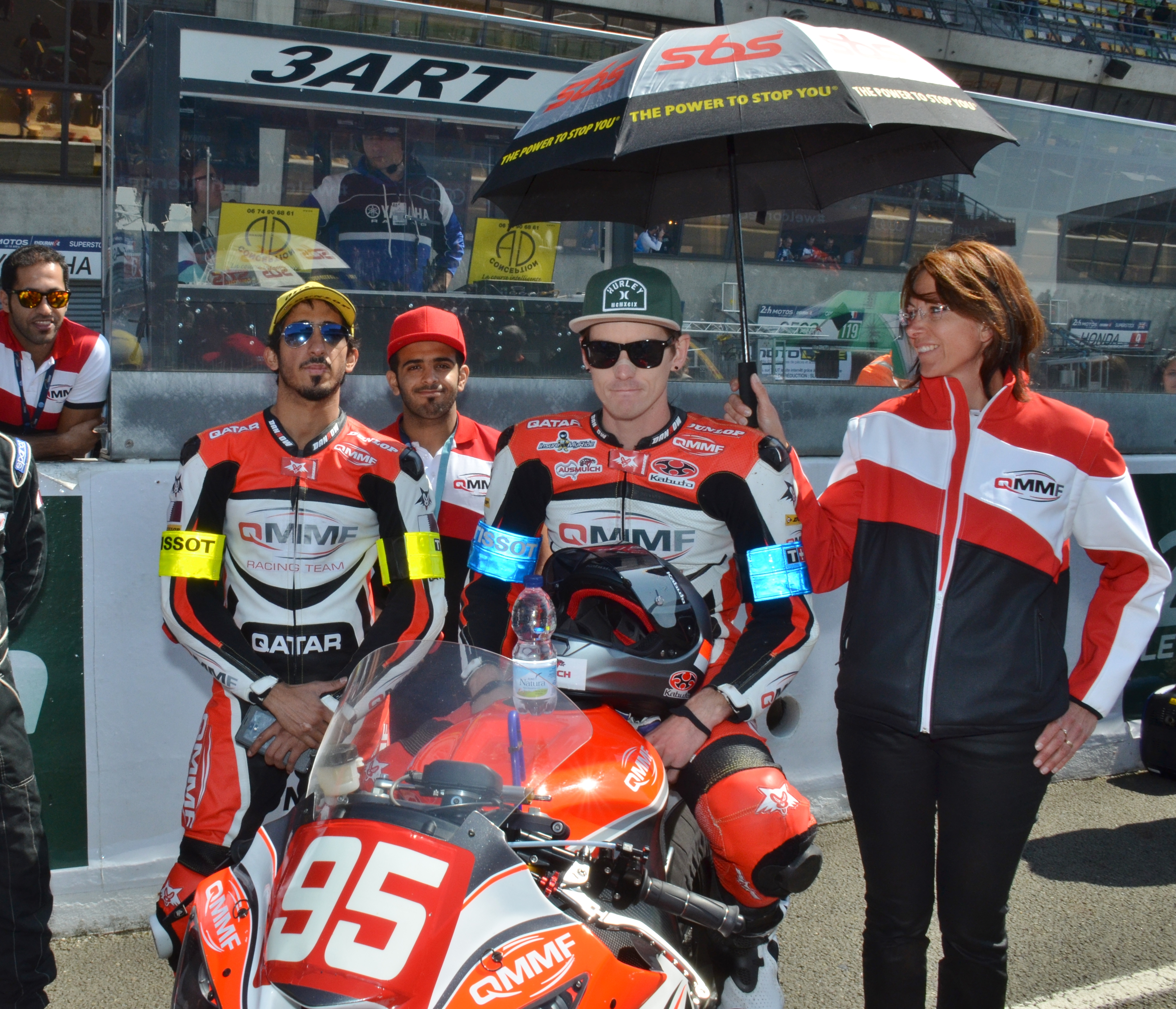 Alex Cudlin aux 24 Heures Moto 2015